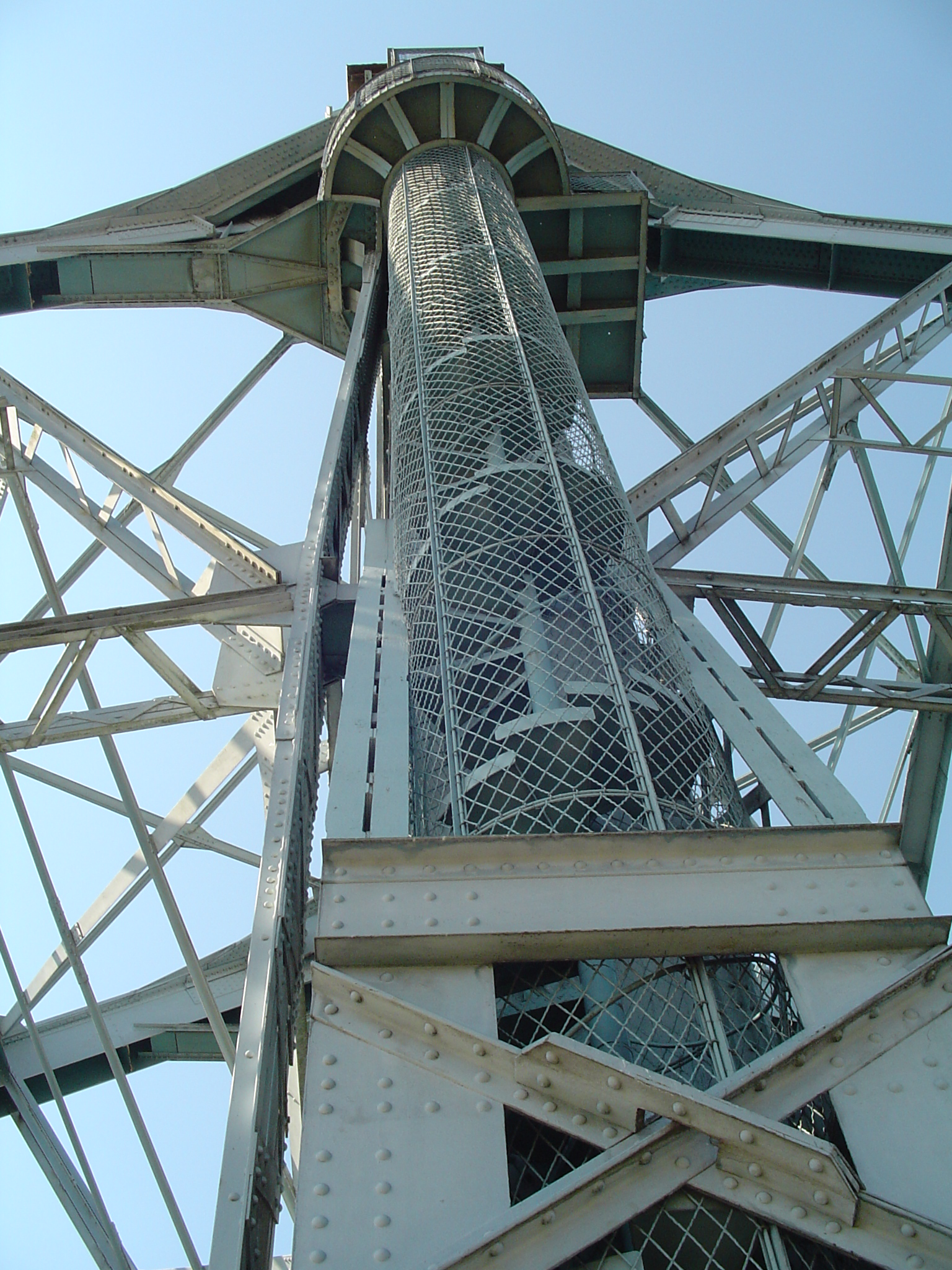 Brückenpfahl des Blauen Wunders in Dresden